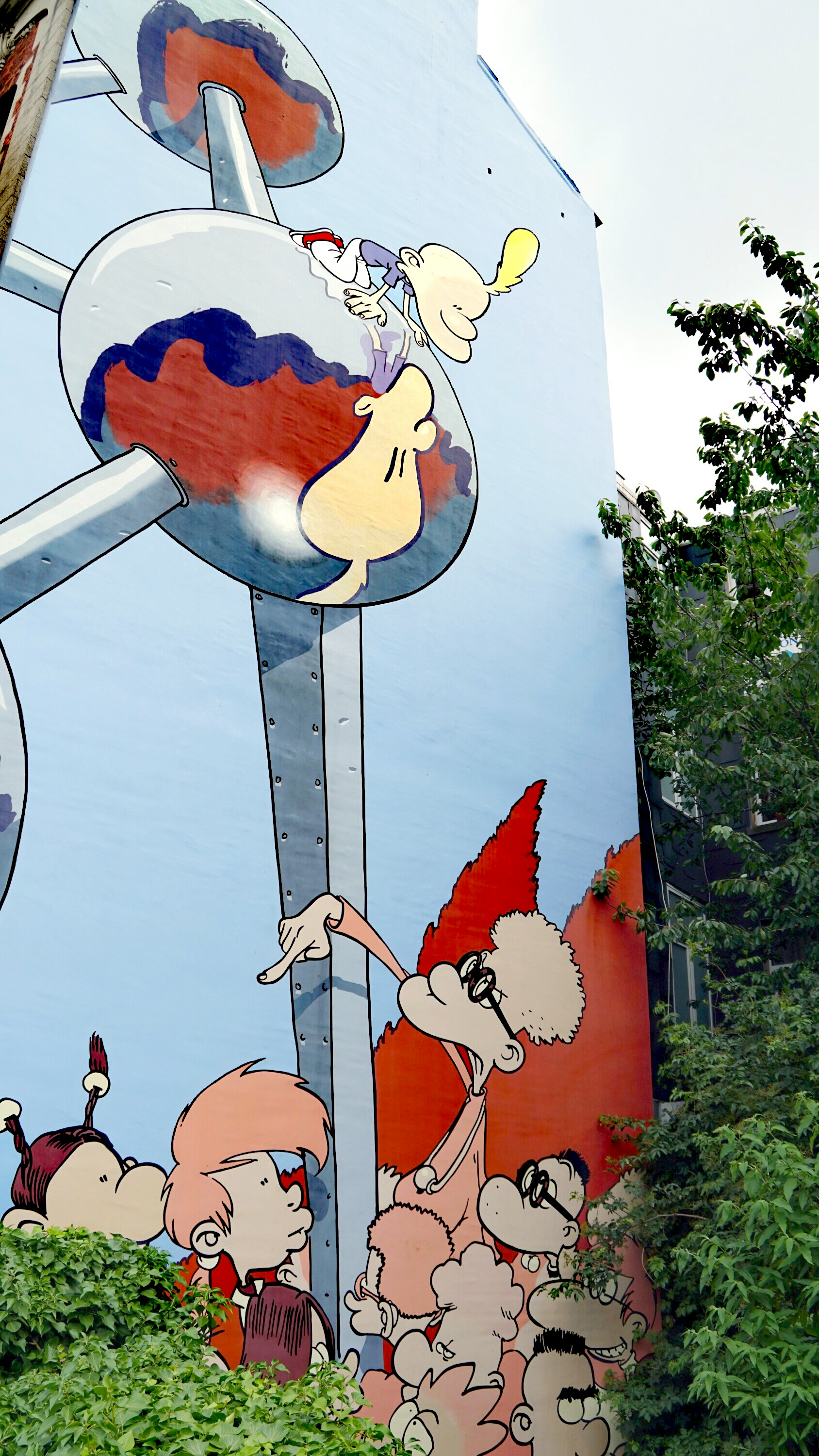 Titeuf. Comicwand in Laeken/Brüssel, Avenue Bockstael (Parcours bande dessinée)[1]